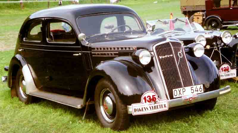 Volvo PV51 4-Door Sedan 1937